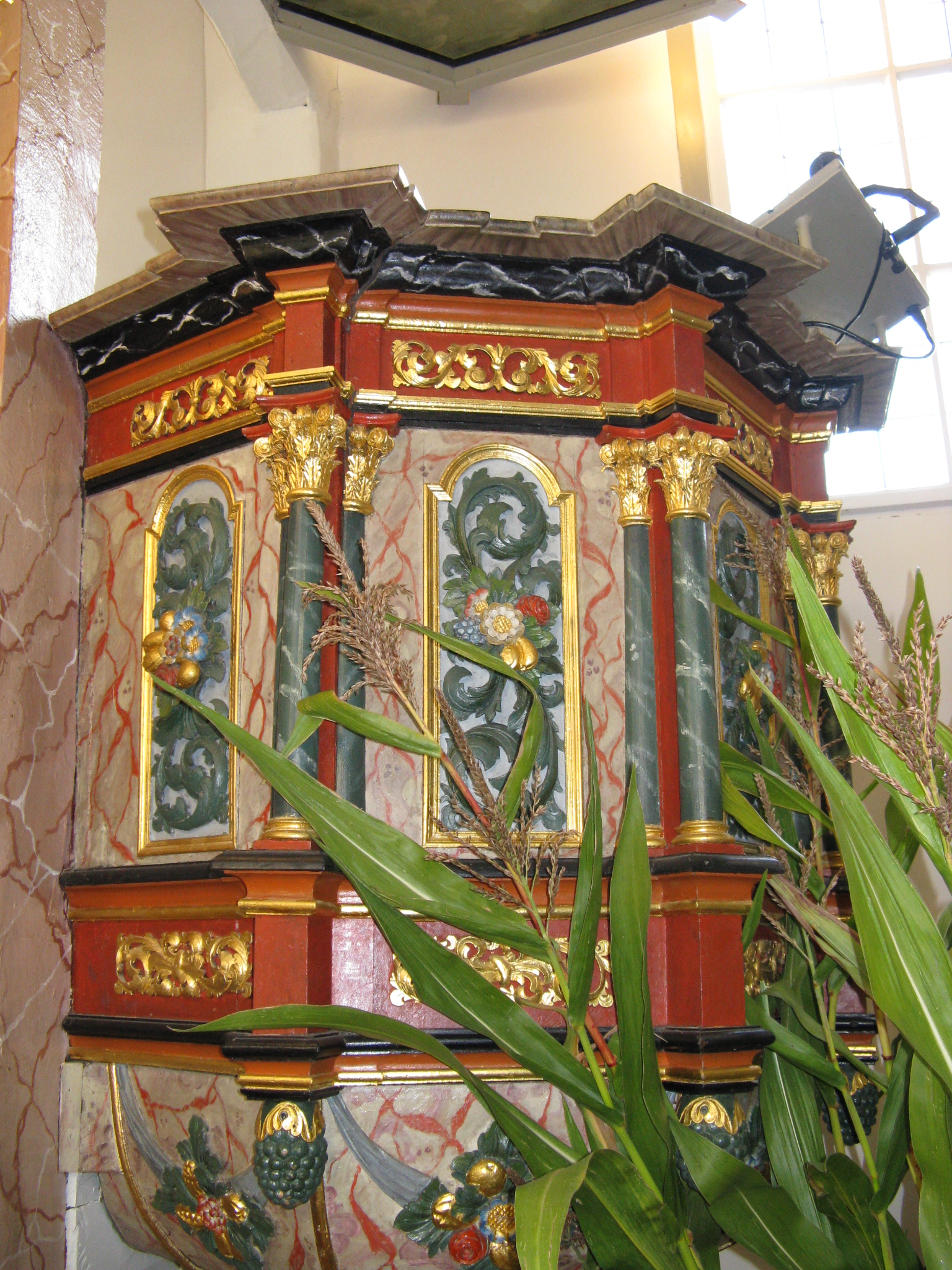 Church of Unter-Seibertenrod, pulpit, Vogelsberg/Germany